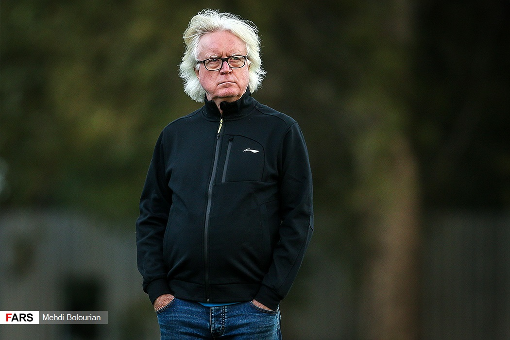 تمرین اول استقلال با شفر